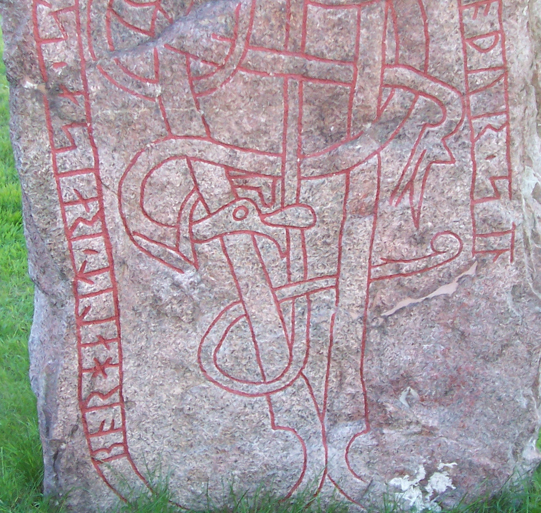 Photo taken by me in 2005 - Uppsala, Stockholm - Sweden.